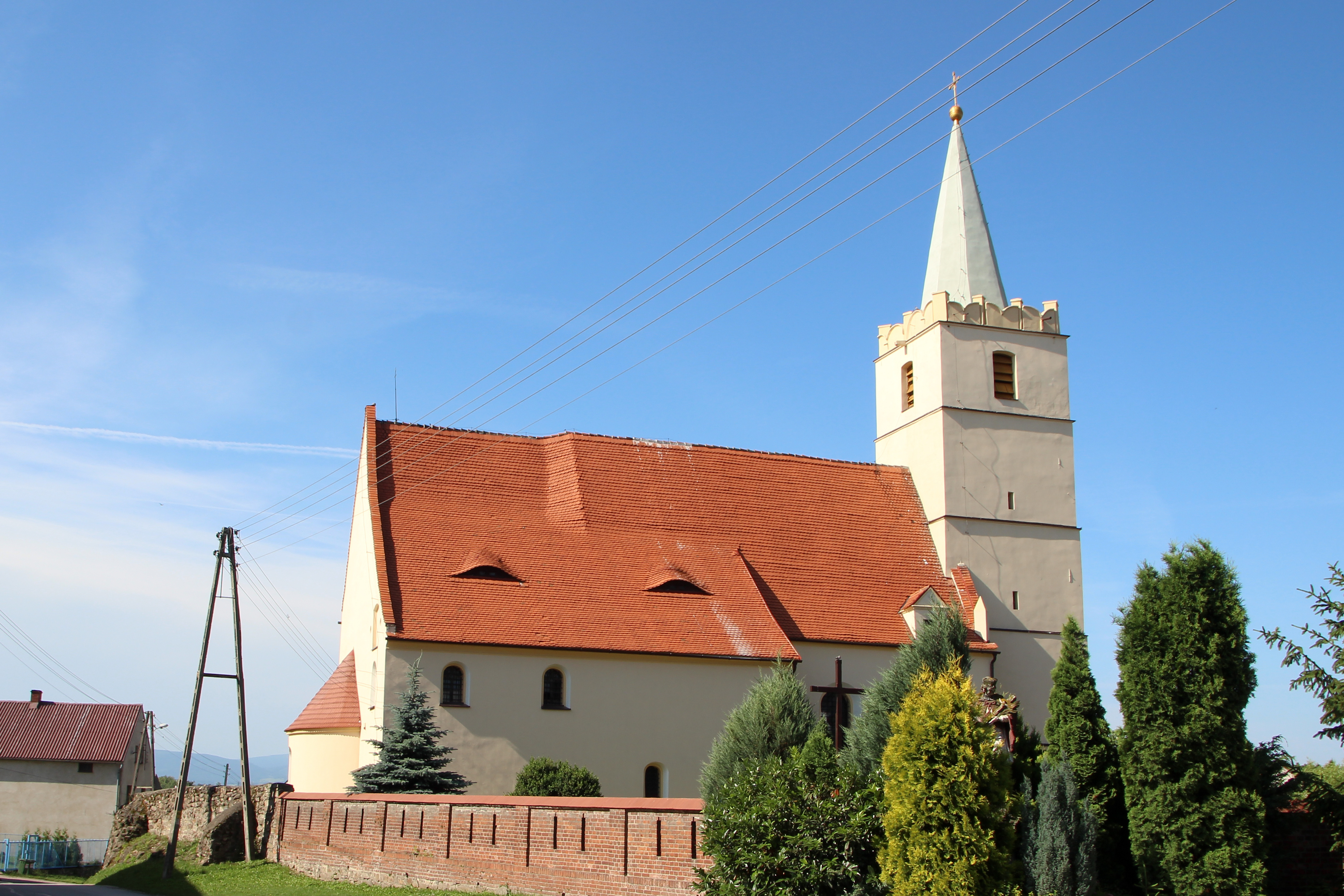 Wierzbięcice - wieś w Polsce w opolskim, w powiecie nyskim, w gminie Nysa.